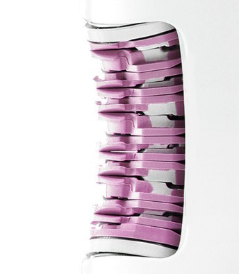 Epilierkopf